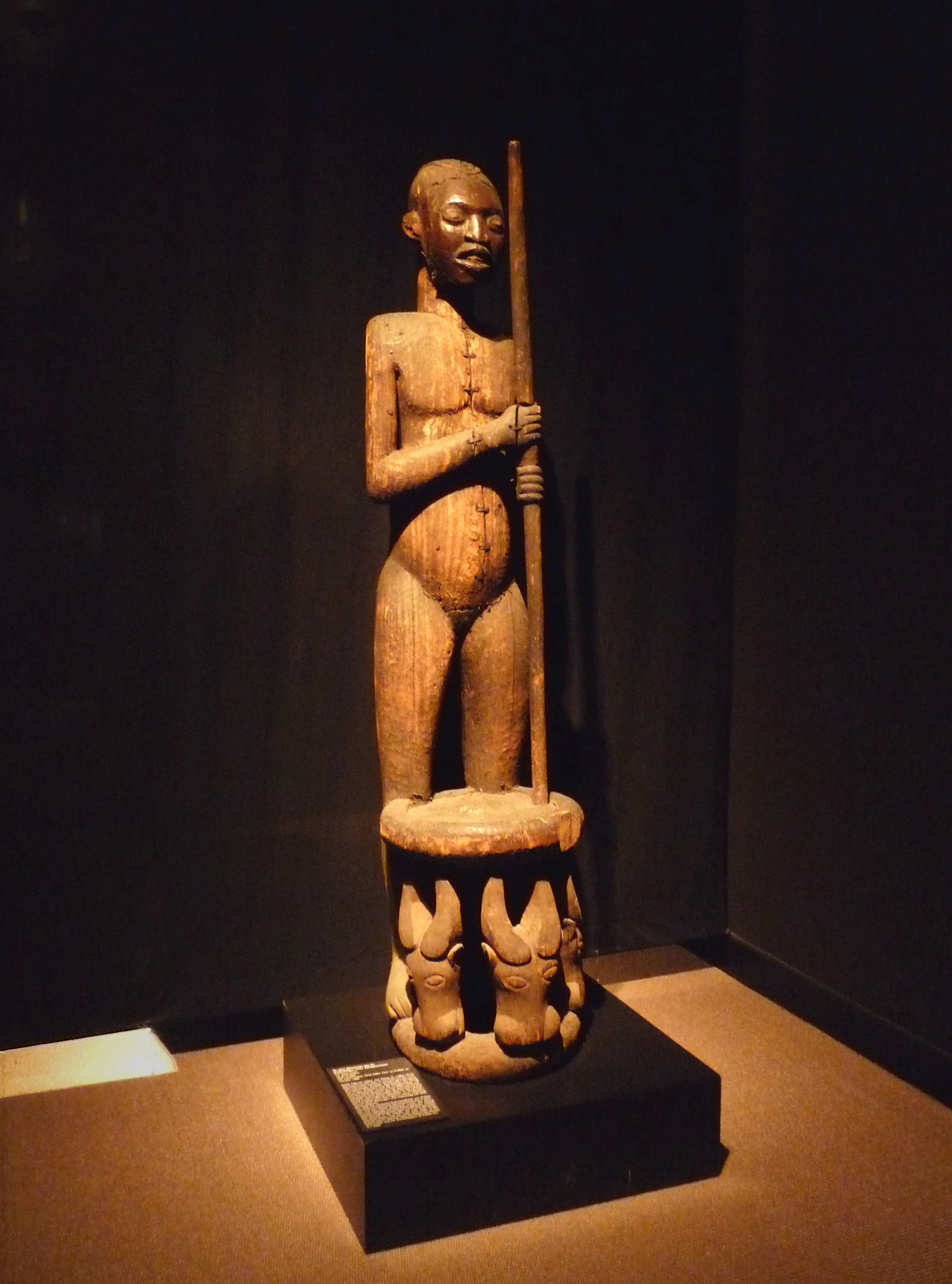 Statue commémorative d'une reine-mère. Cameroun, Kom. 19e siècle. Bois, cuivre. La statuette aurait été sculptée par le roi Yu (1865-1912) ou son atelier. (Musée ethnologique de Berlin)